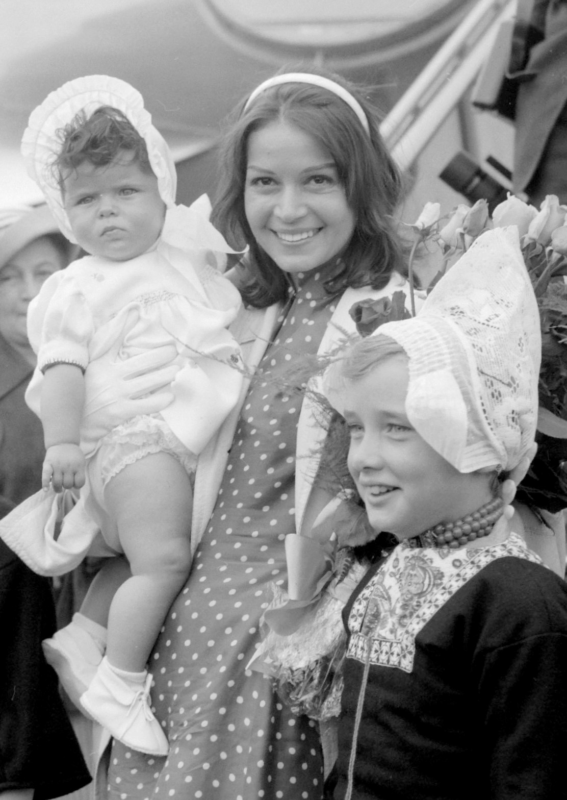 Aankomst van actrice Eva Barlok op Schiphol